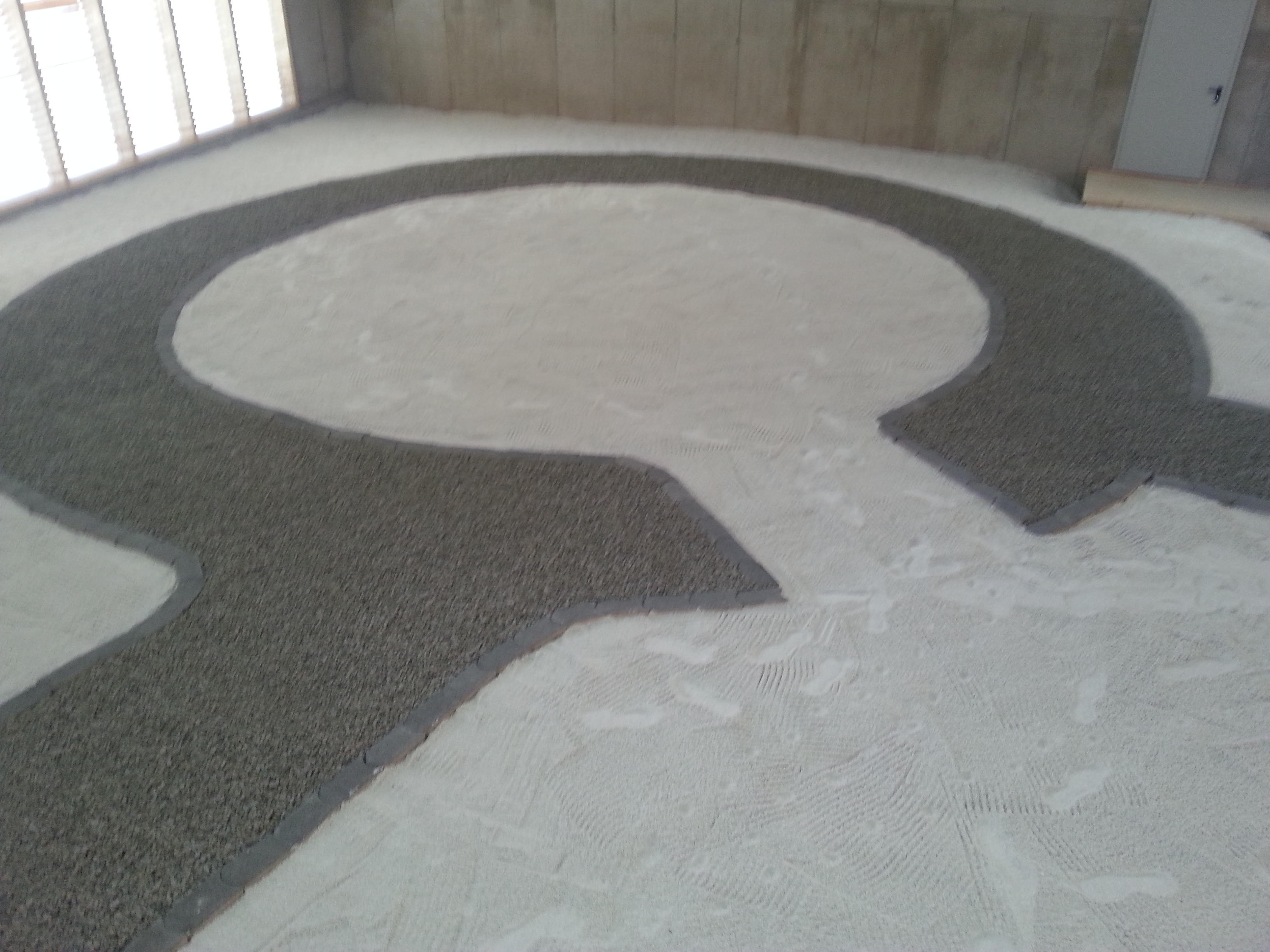 Der Nordostturm des Burgus von Oberranna. Er wurde bislang nicht freigelegt, seine Position wurde mittels Kiesbestreuung markiert.